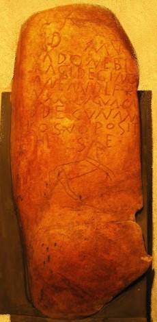 Epitafio de Vado Nebira. AE 1976, 308 = HEp. 1, 1989, 400 = IRPLeon 283 = ERPLeon 395: D(is) M(anibus) / Vado Nebi/ra Idegino / Anemidi f(ilius) Va(diniensis) / an(norum) XXX Lugua Ca/ddecun am/ico suo pos(u)it / h(ic) s(itus) e(st)